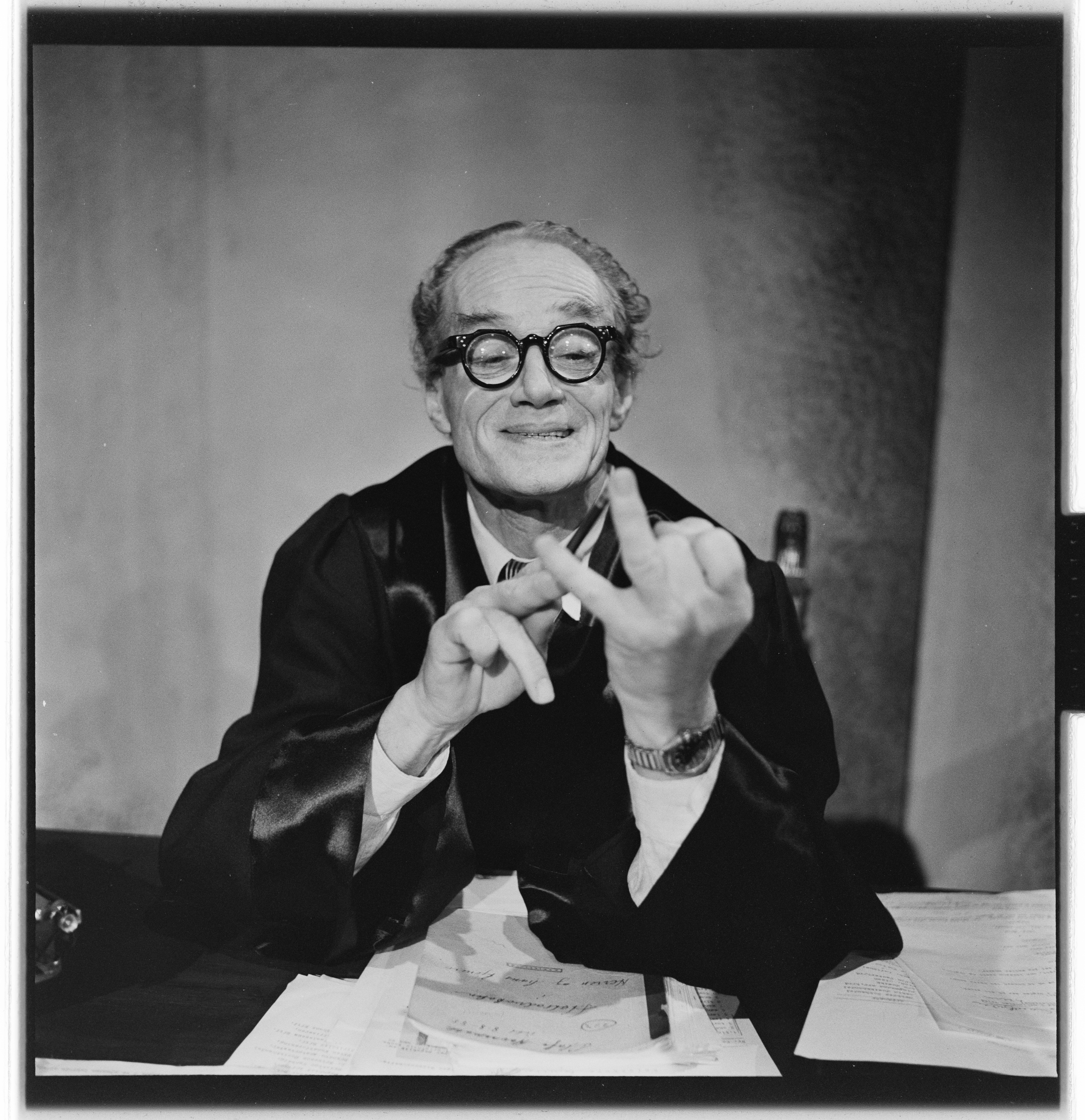 Bildet er hentet fra Arkivverket. Herren og hans tjenere, Nationaltheatret. Arkivinstitusjon : Riksarkivet Arkivnavn : Billedbladet NÅ Sted : Norge, Oslo, Oslo, Nationaltheatret Emneord: teater, skuespillere Avbildet